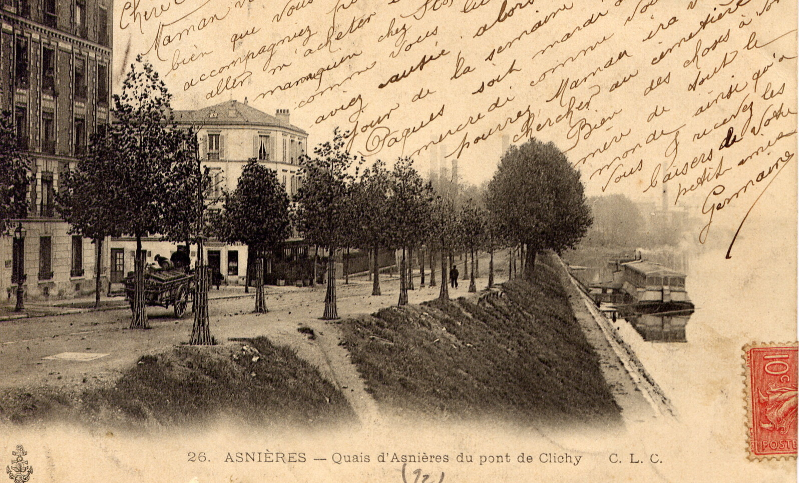 Asnières-sur-Seine.Quais d'Asnières vus du Pont de Clichy.Quai du Docteur-Dervaux